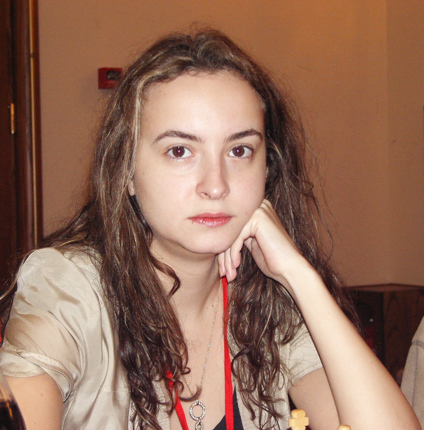 GM Antoaneta Stefanova Bulgaria, EuroChess Iraklion 2007